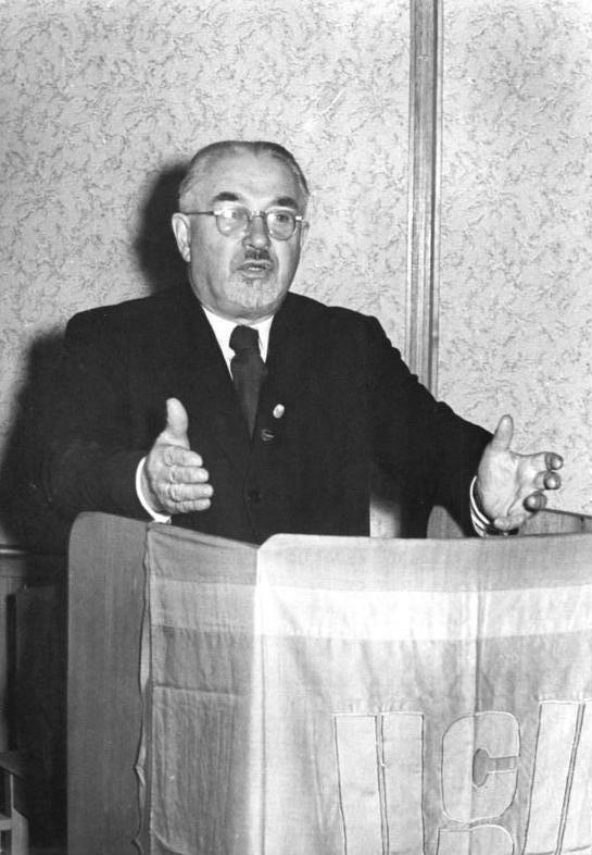 Illus Quaschinsky Kno-Leu. 25.1.1951 Tagung des Hauptvorstandes der CDU am 25. Januar 1951 im Haus der Volkskammer in Berlin UBz: Otto Nuschke bei seinem Referat Leihweise Illus Berlin WS